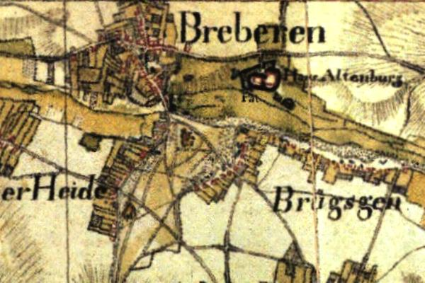 Kartenaufnahme der Rheinlande 1804/05